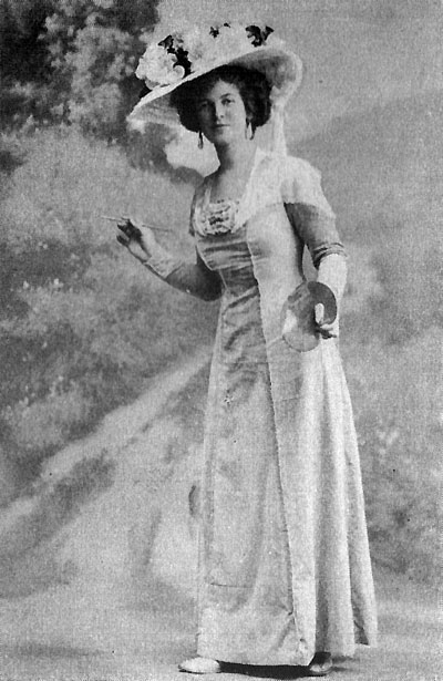 Hilma Barcklind i Bykomptessen